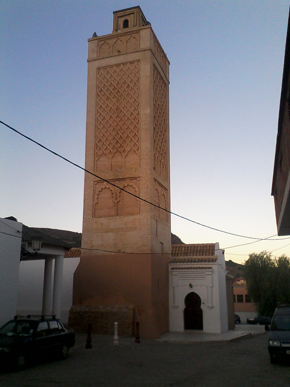 Grande Mosquée